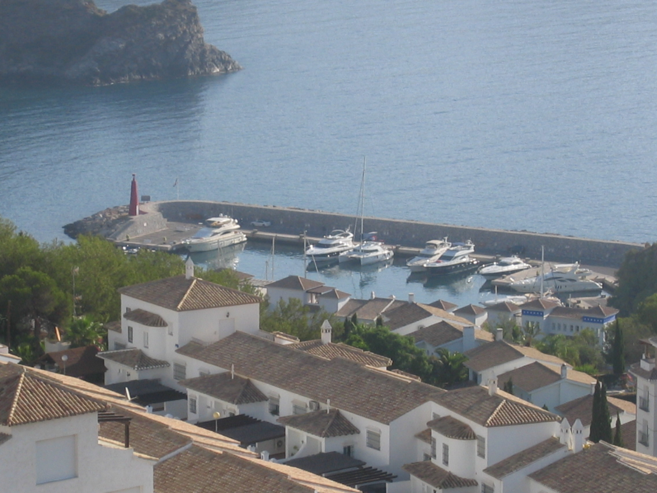 Puerto deportivo de Maria del Este desde el faro de La Herradura